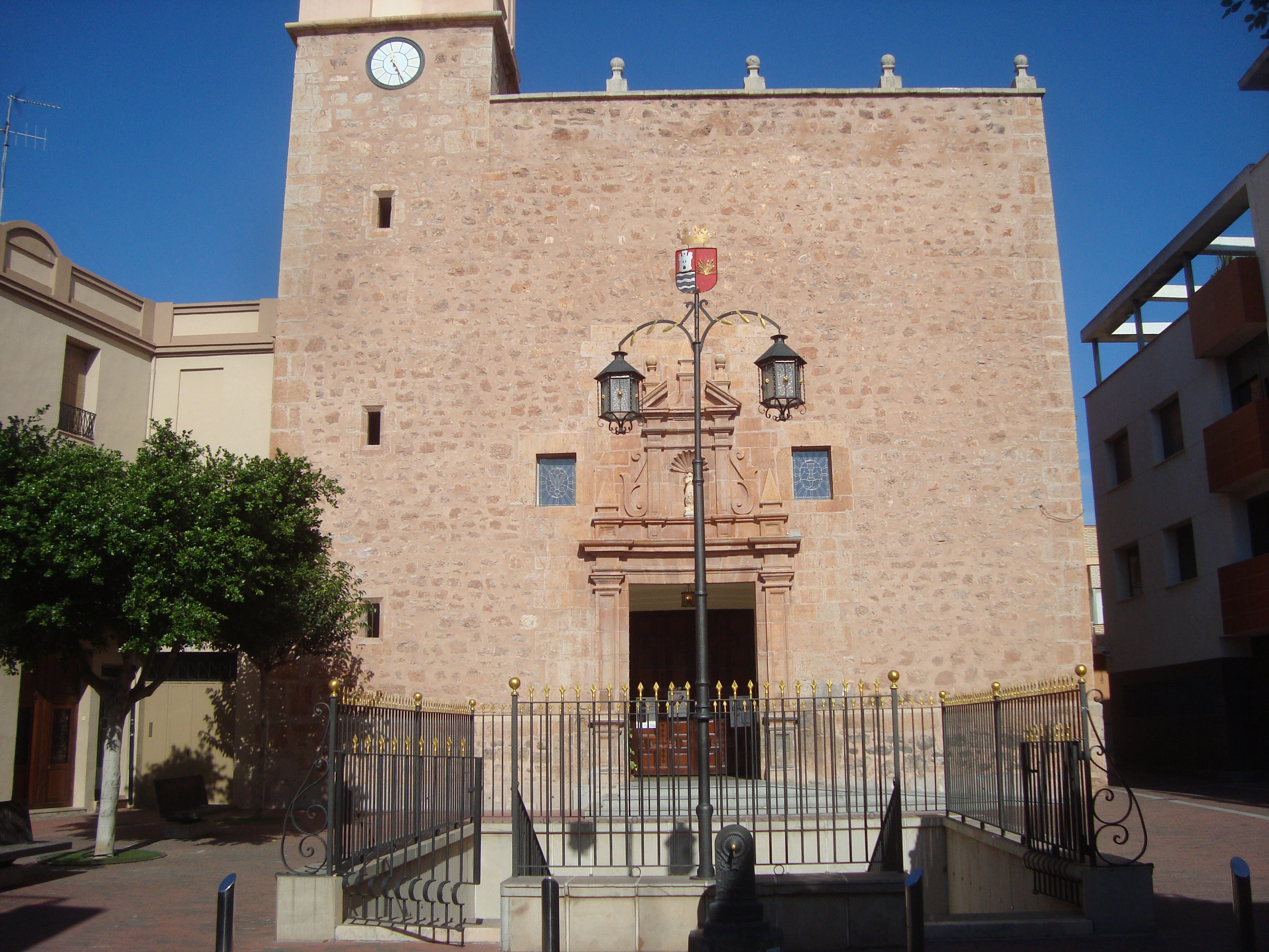 Església de l'Assumpció (Xilxes) 06.053-001.